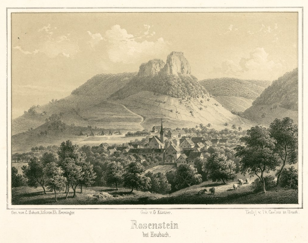 Heubach und der Rosenstein